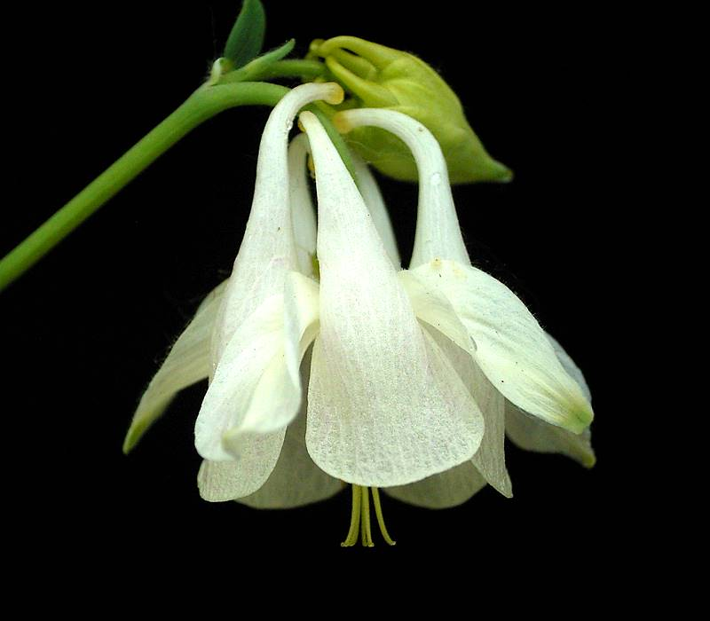 Aquilegia vulgaris